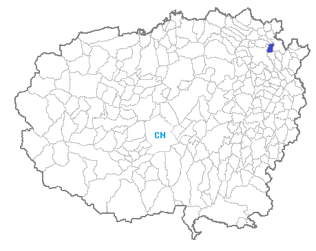 Posizione del comune nella provincia di Cuneo